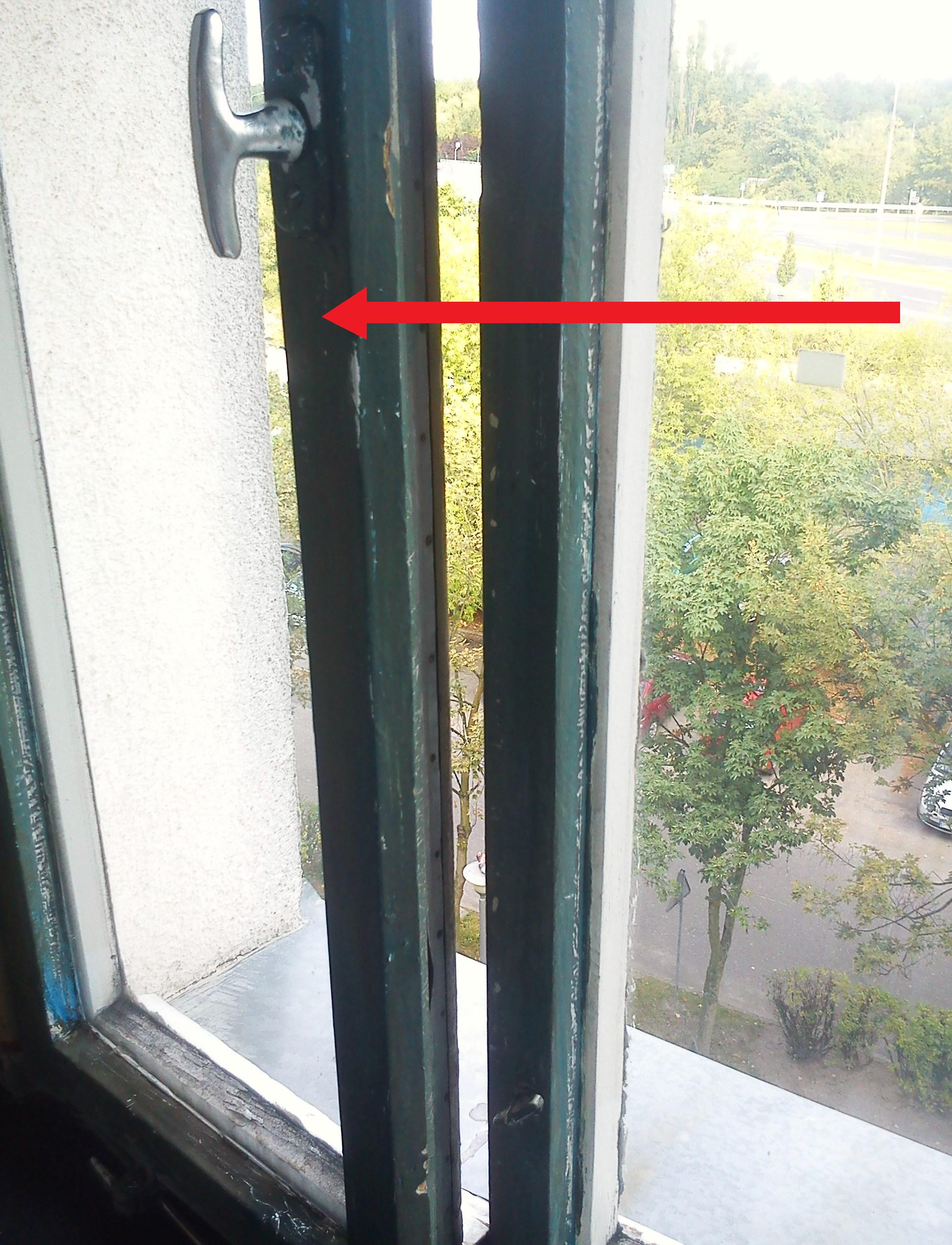 Listwa przymykowa polskiego okna (Poznań).